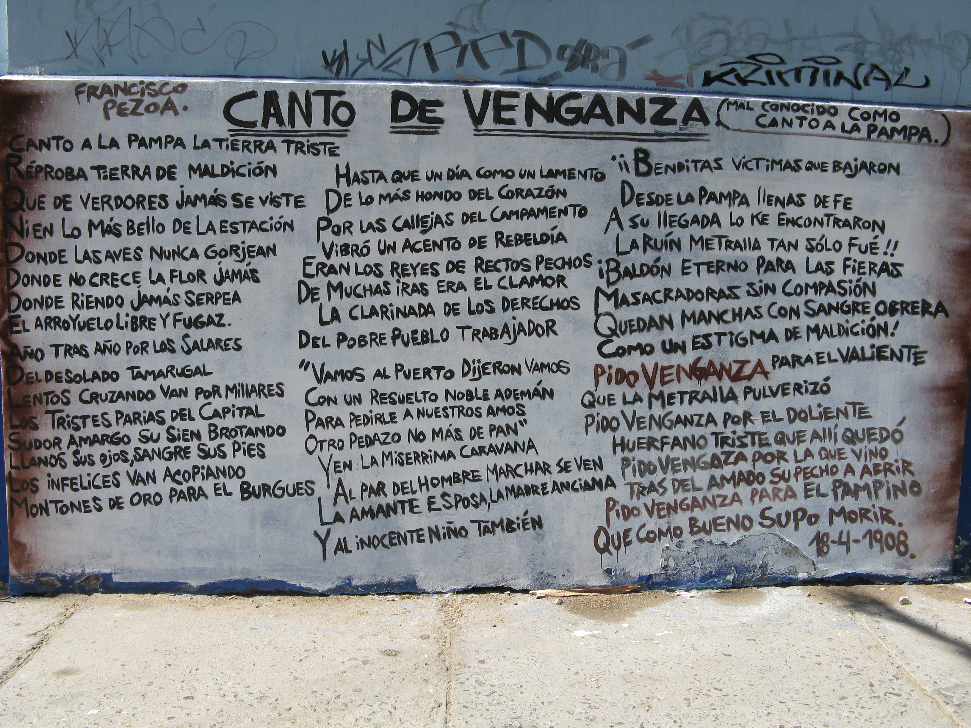 Muralla de la "Escuela Domingo Santa María" de Iquique, Chile.